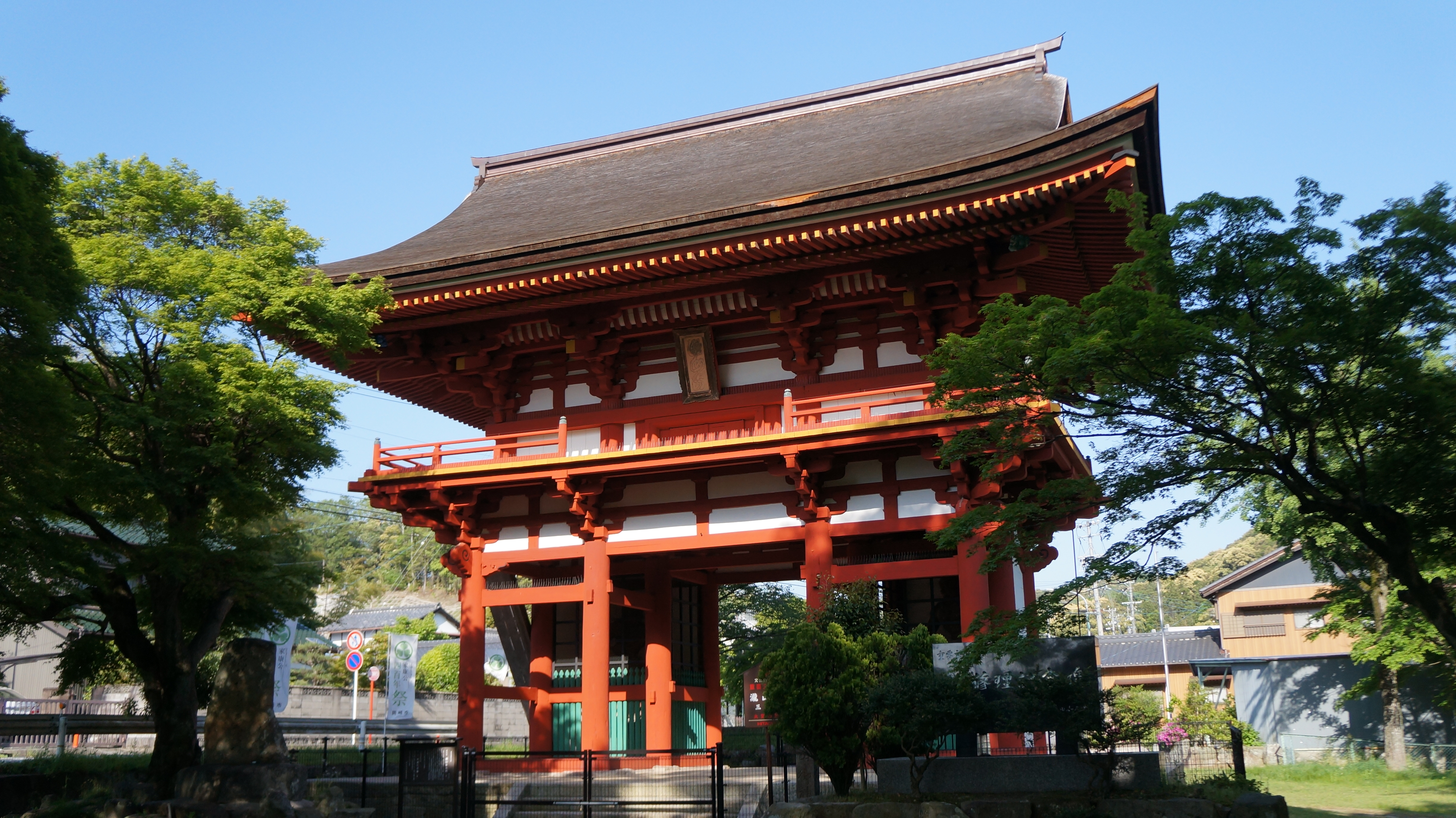 愛知県岡崎市の滝山寺三門（重要文化財）